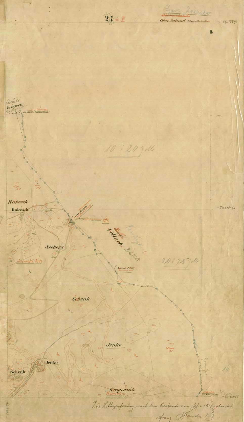 historische Vermessungskarte: franziszeischer Kataster, Seebergsattel in Südkärnten, ab 1919 an der Grenze von Kärnten und Slowenien. Arbeitsunterlage für die Lithographierung 1917.